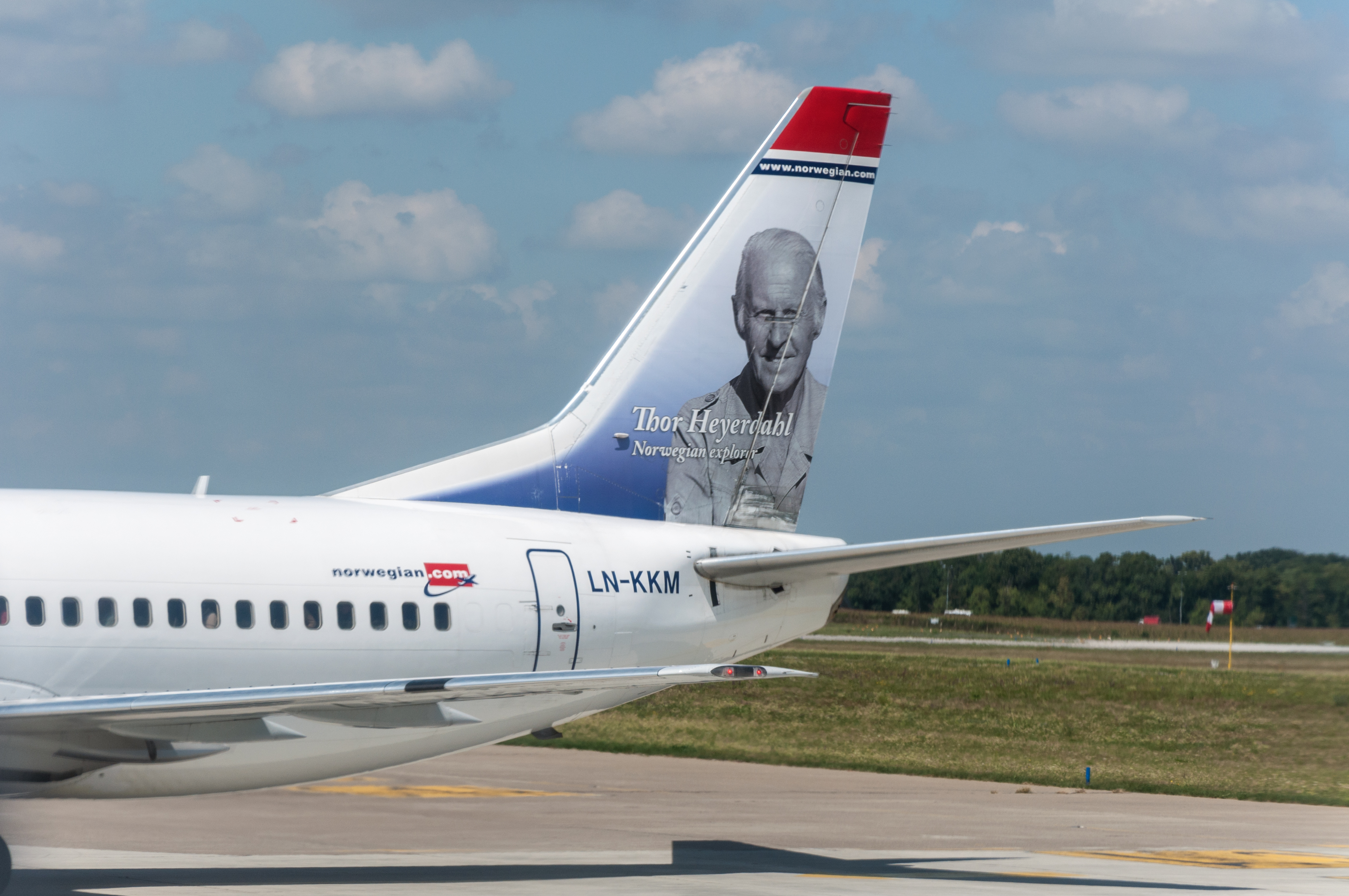 Serbia, Norwegien B737 at Belgrade airport